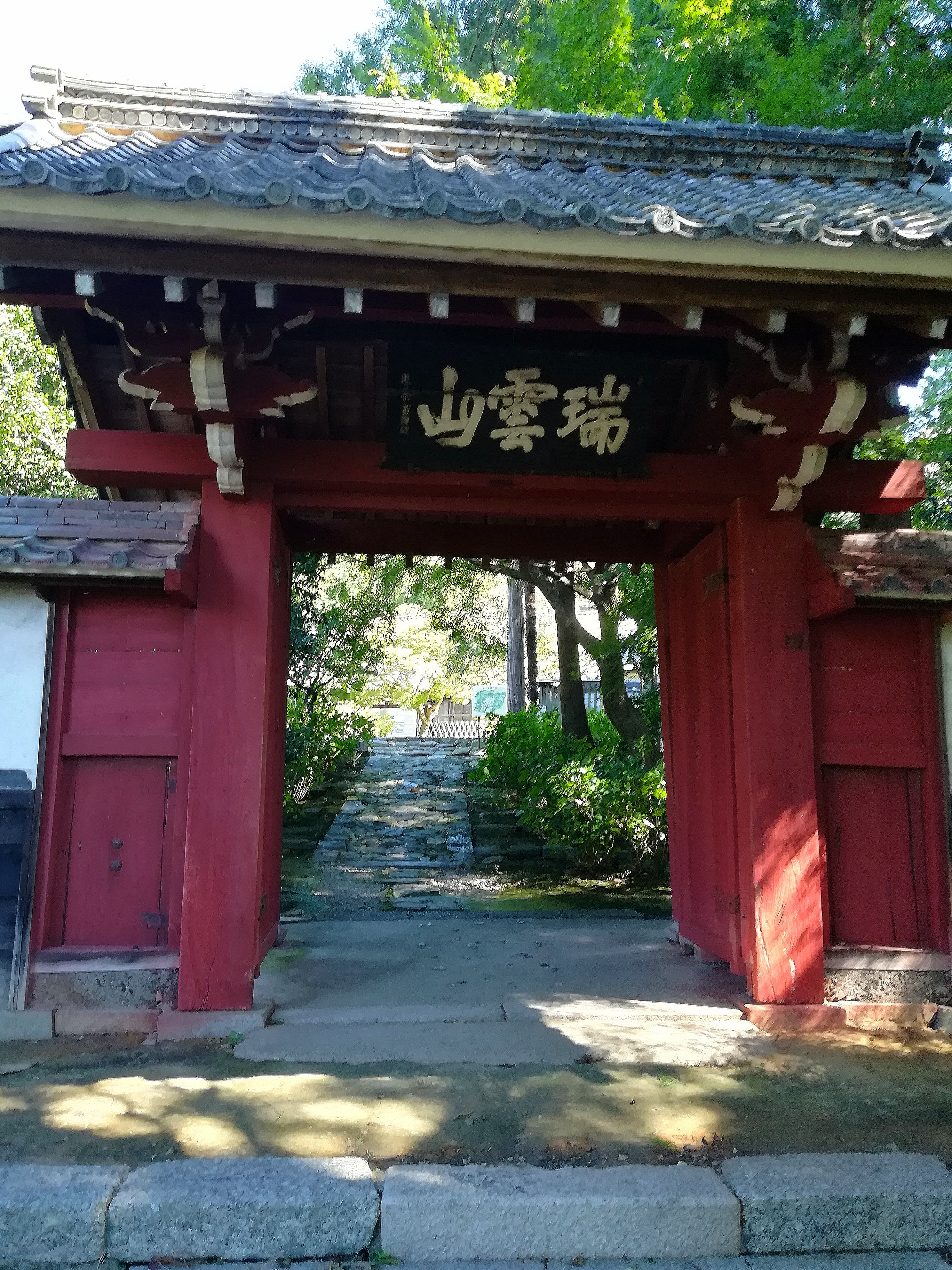 瑞雲山本光寺 東廟所 山門 2019年10月13日撮影